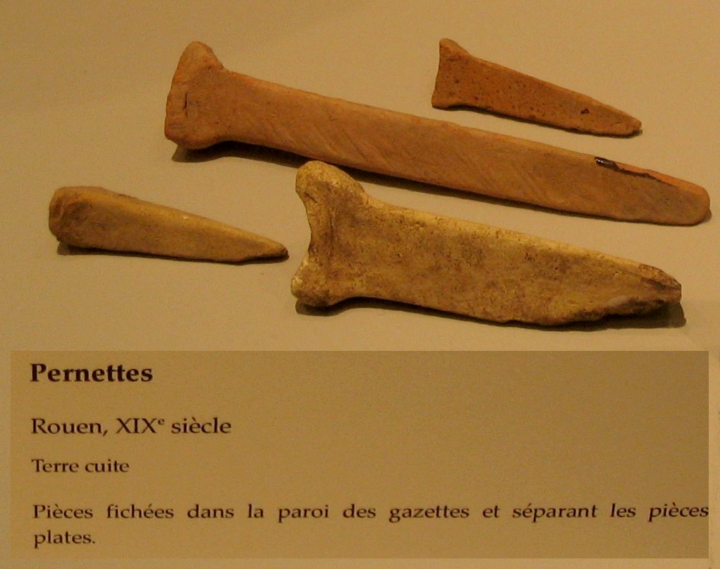 Pernettes de section triangulaire destinées à séparer les pièces placées dans une cazette. Musée de la céramique de Rouen. France